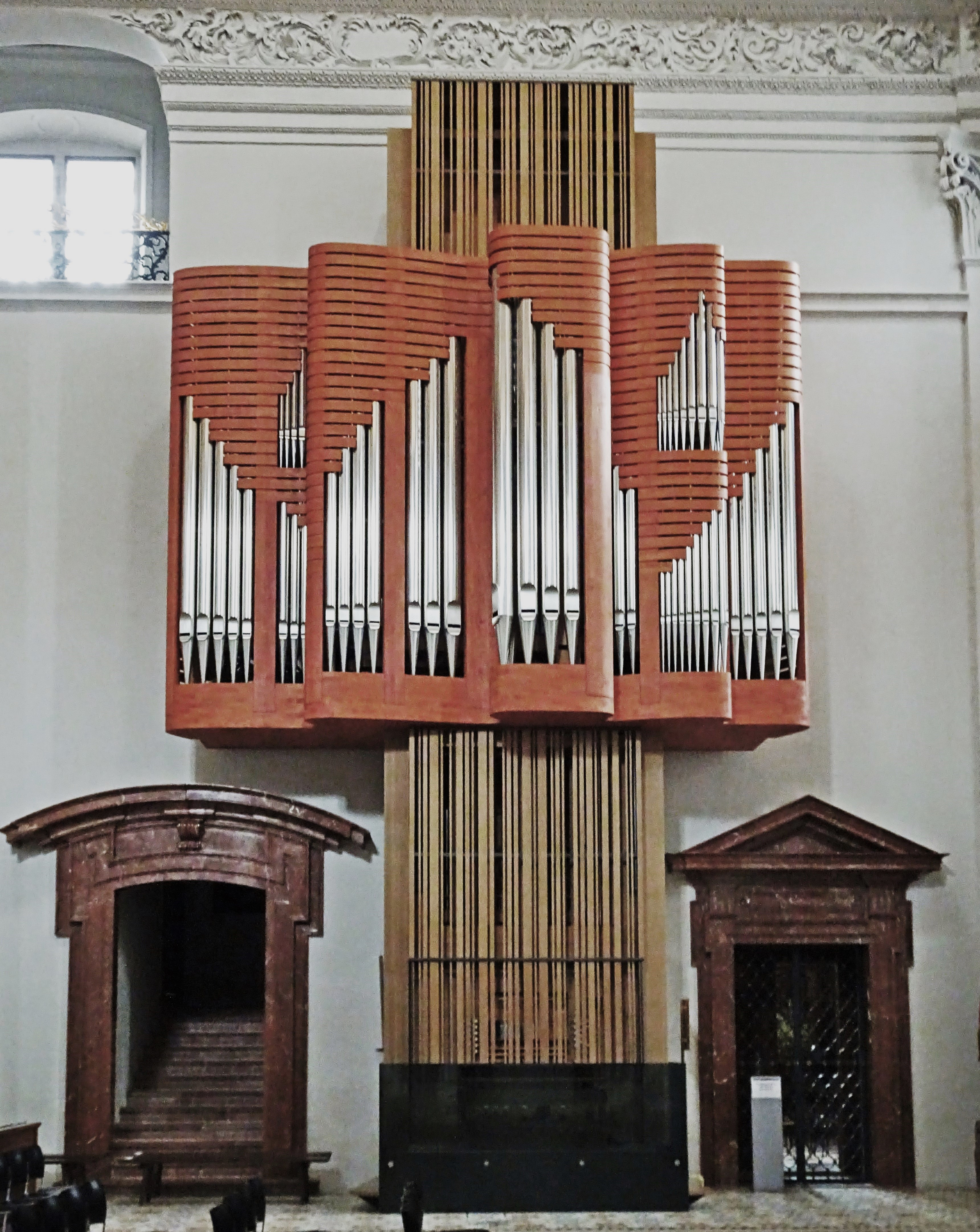 Pfarr- und Wallfahrtskirche Mariazell, Mariazeller Orgel